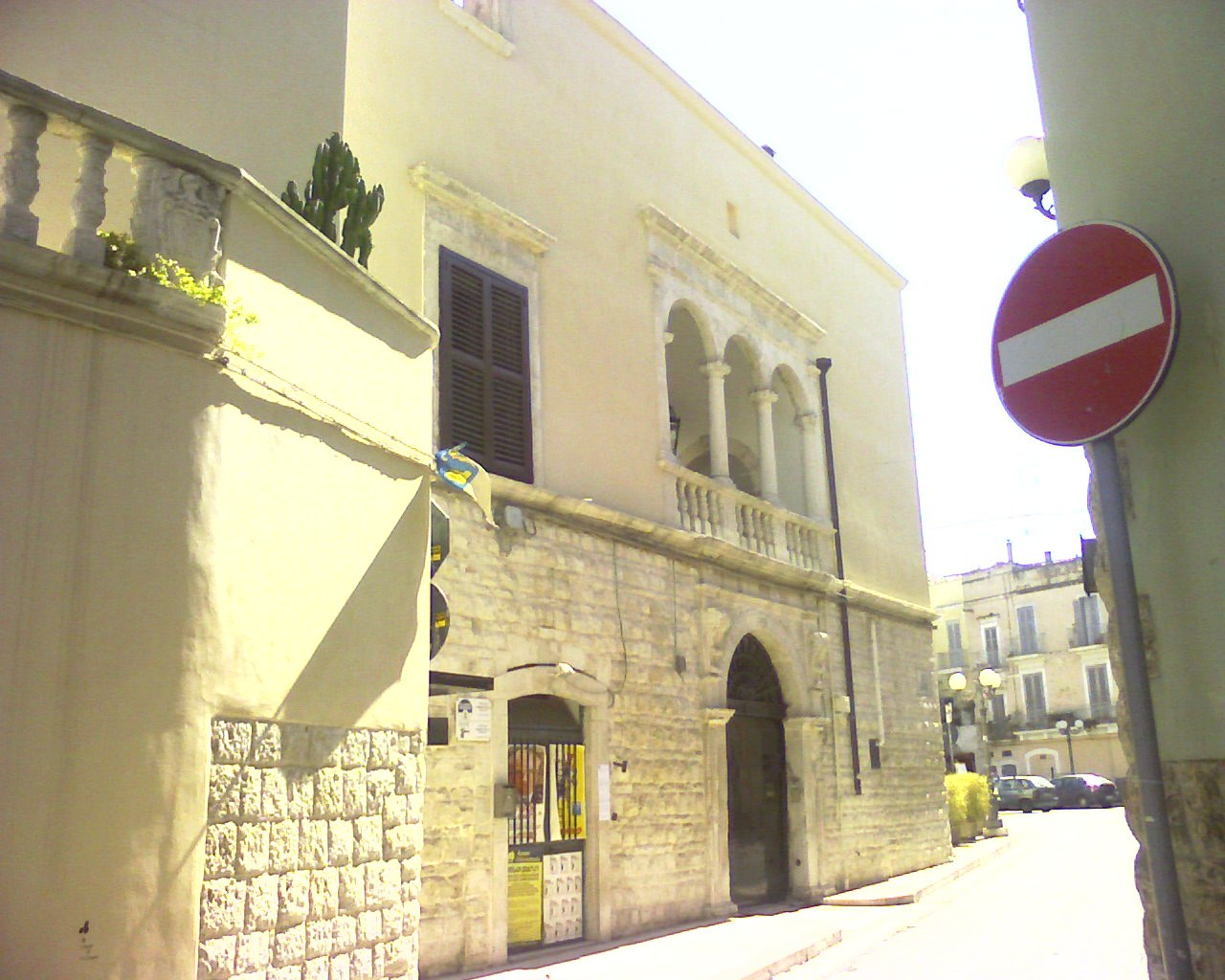 palazzo angarano-maranta-Modugno (Bari) - Italy